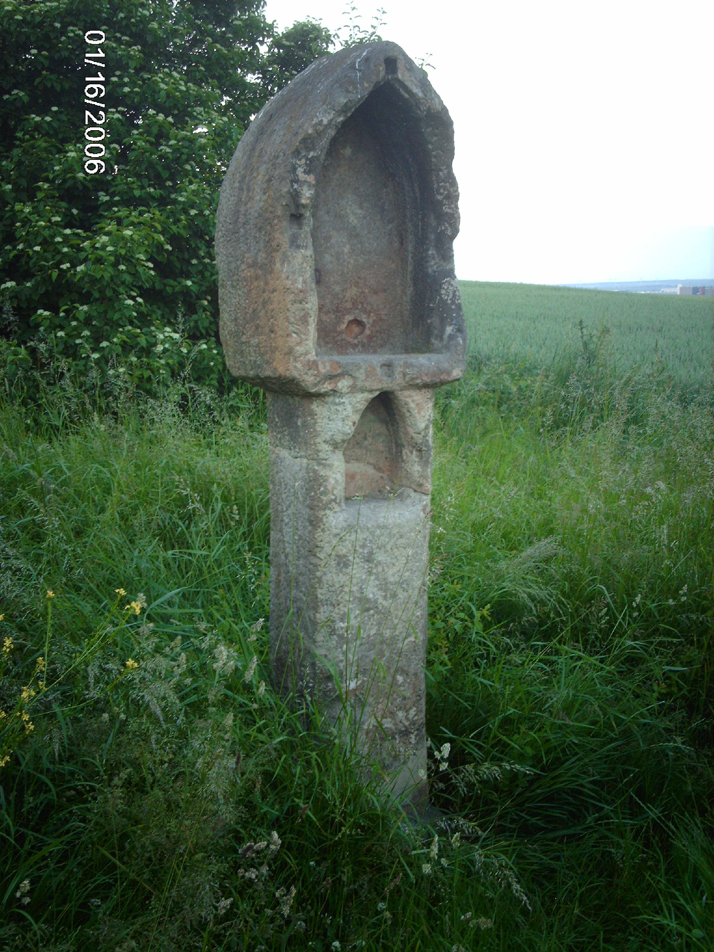 Marterl aus dem 15. Jahrhundert in Arnstadt/Deutschland, genannt "Riesenlöffel".